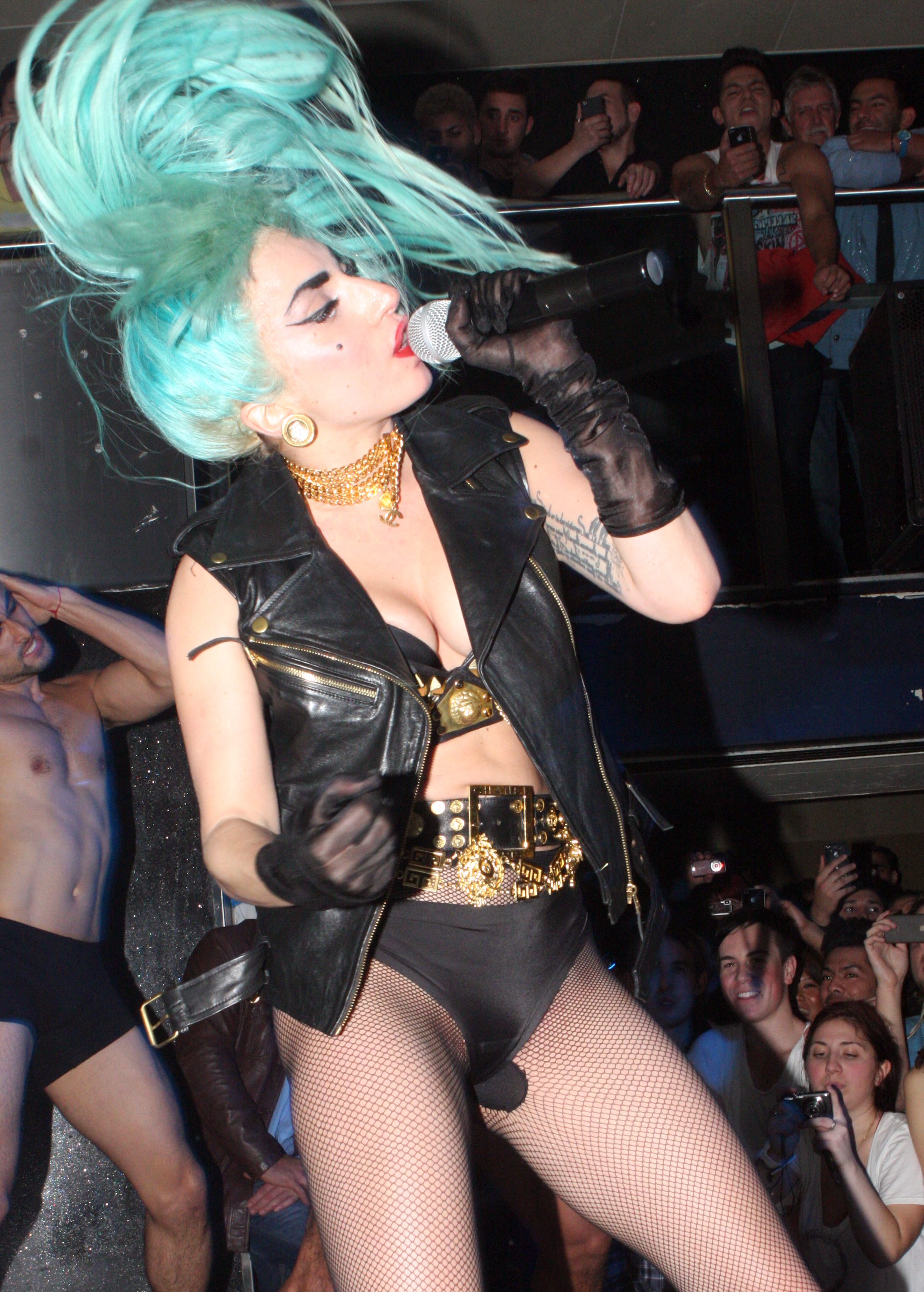 Lady Gaga